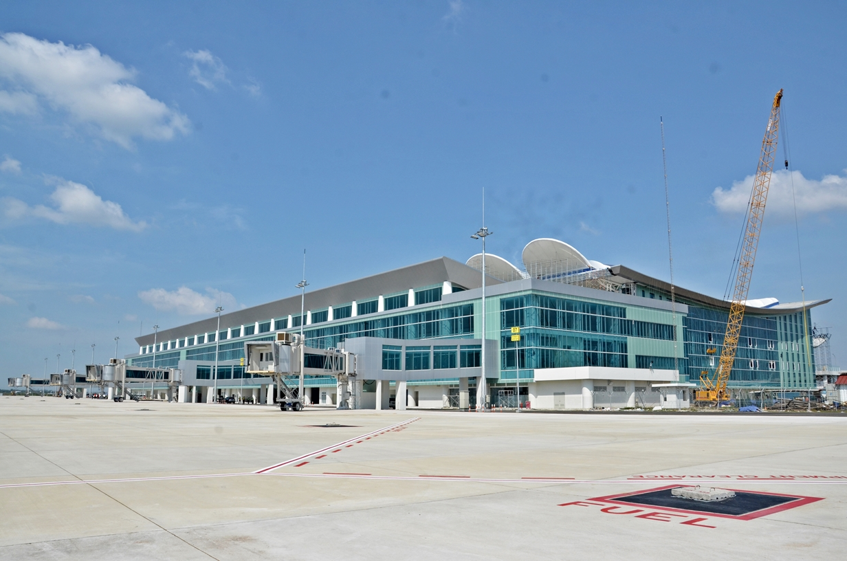 17.04.2018 Peninjauan Bandara Internasional Jawa Barat, di Kertajati, Majalengka, Jawa Barat oleh Presiden RI Joko Widodo (BKIP Kemenhub/Hari S Buyung)